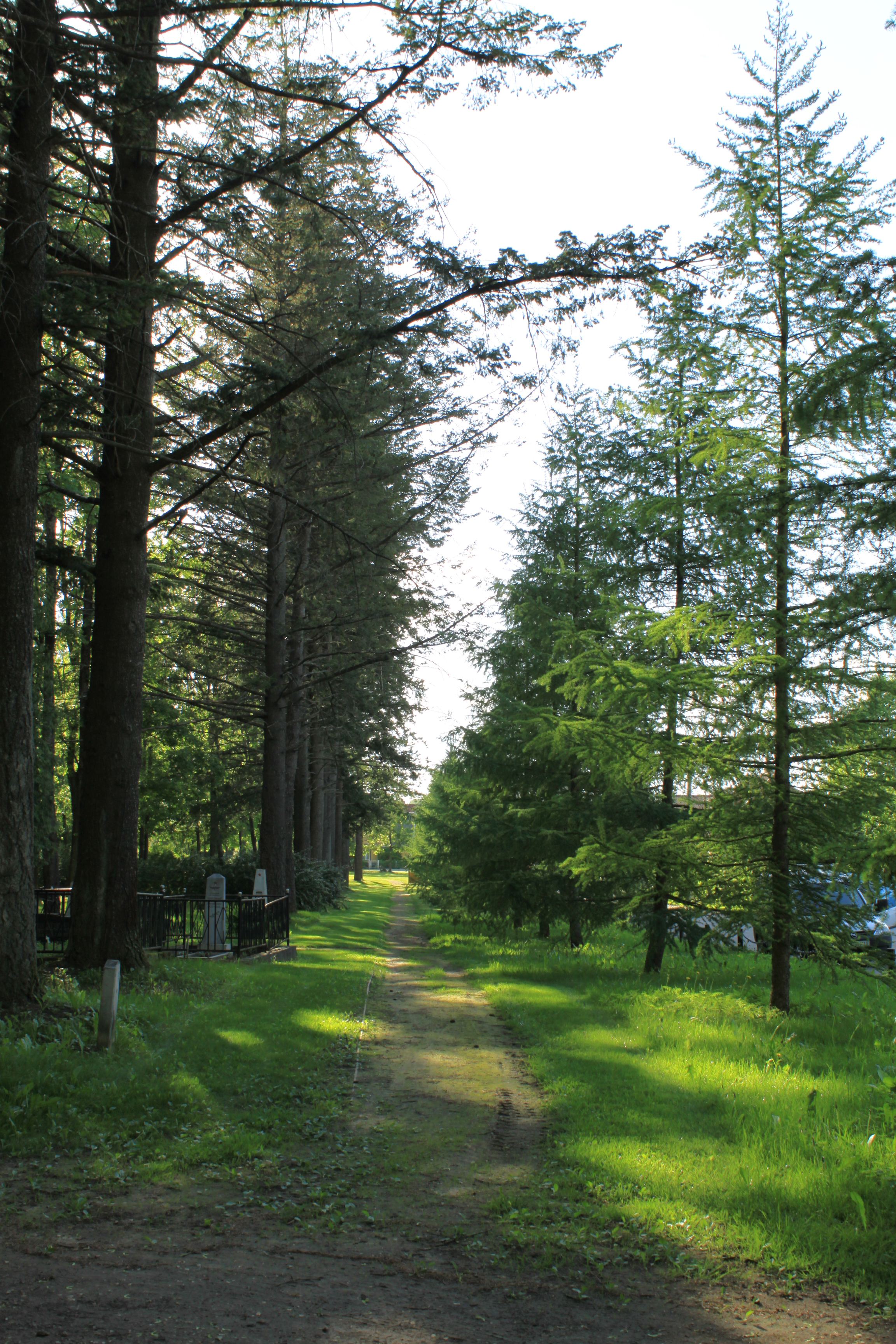 Ebatsuuga allee; (Nurme tn puiestee; Pseudotsuuga allee)